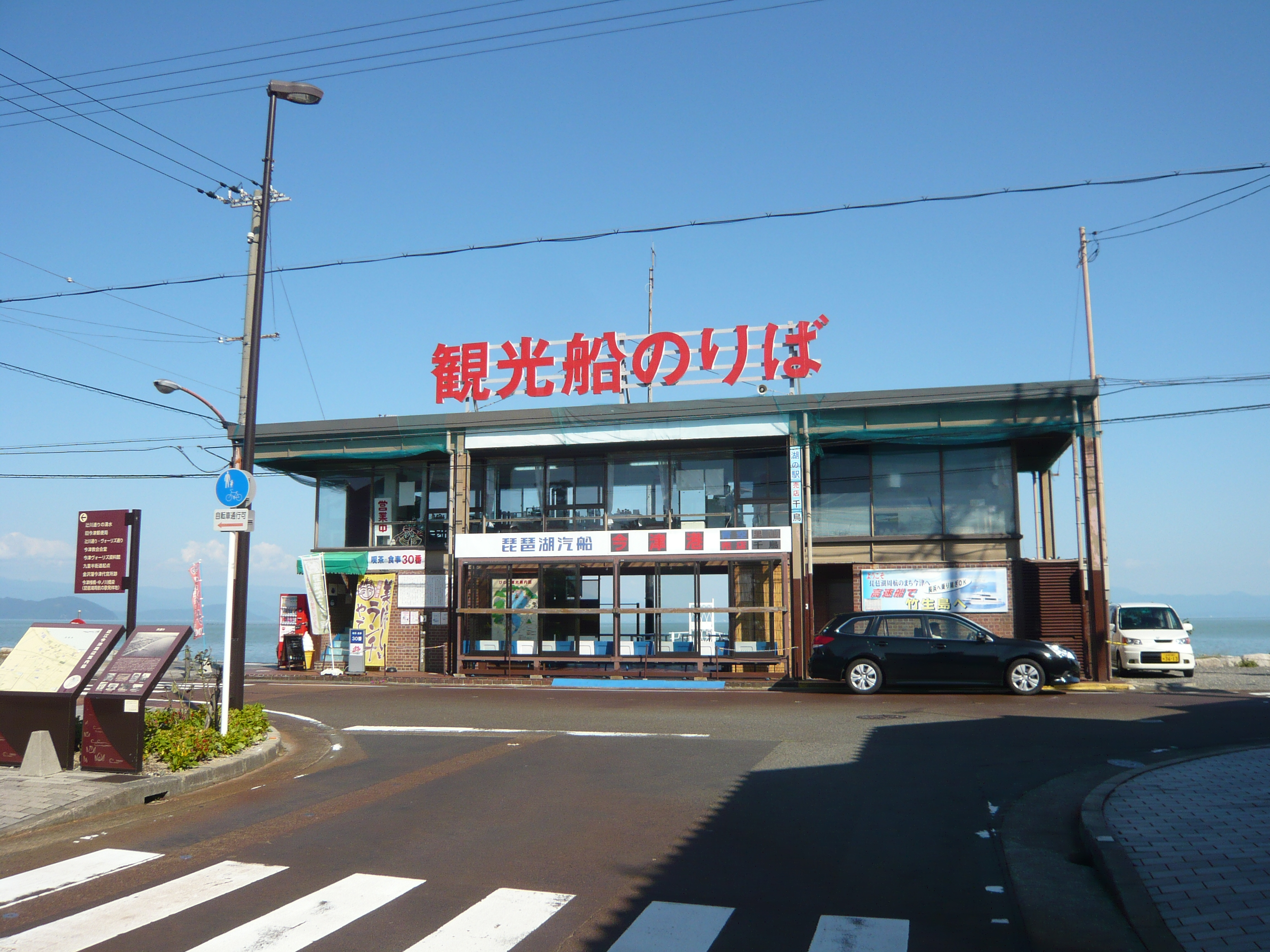 今津港のりば